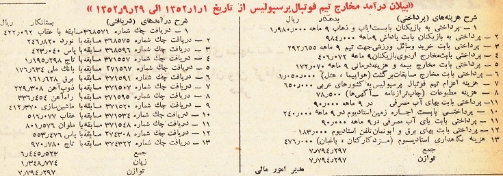 بیلان درآمد و مخارج تیم فوتبال پرسپولیس از تاریخ ۱ فروردین ۱۳۵۲ تا ۲۹ آذر ۱۳۵۲